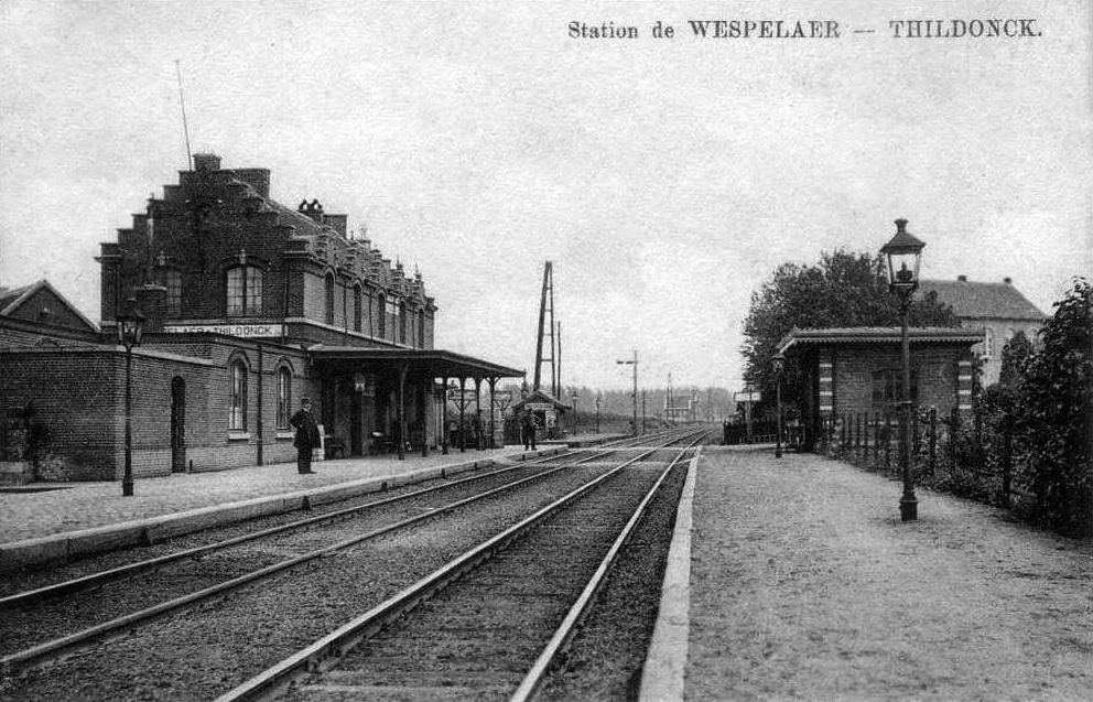 Intérieur de la gare de Wespelaer-Thildonck au début des années 1900.